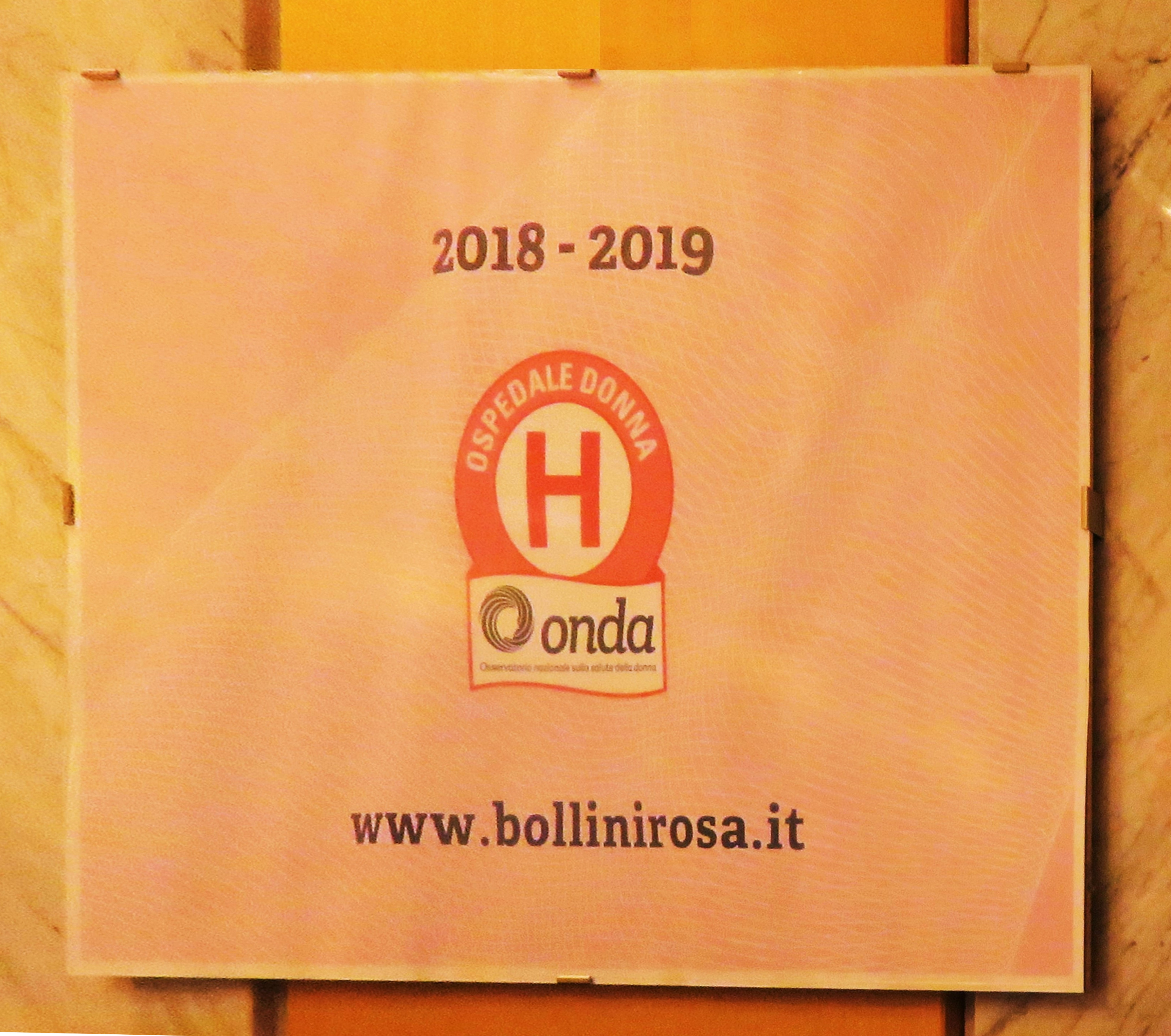 Il Bollino Rosa è un riconoscimento dell'Osservatorio nazionale sulla salute della donna - Onda - Biennio 2018-2019